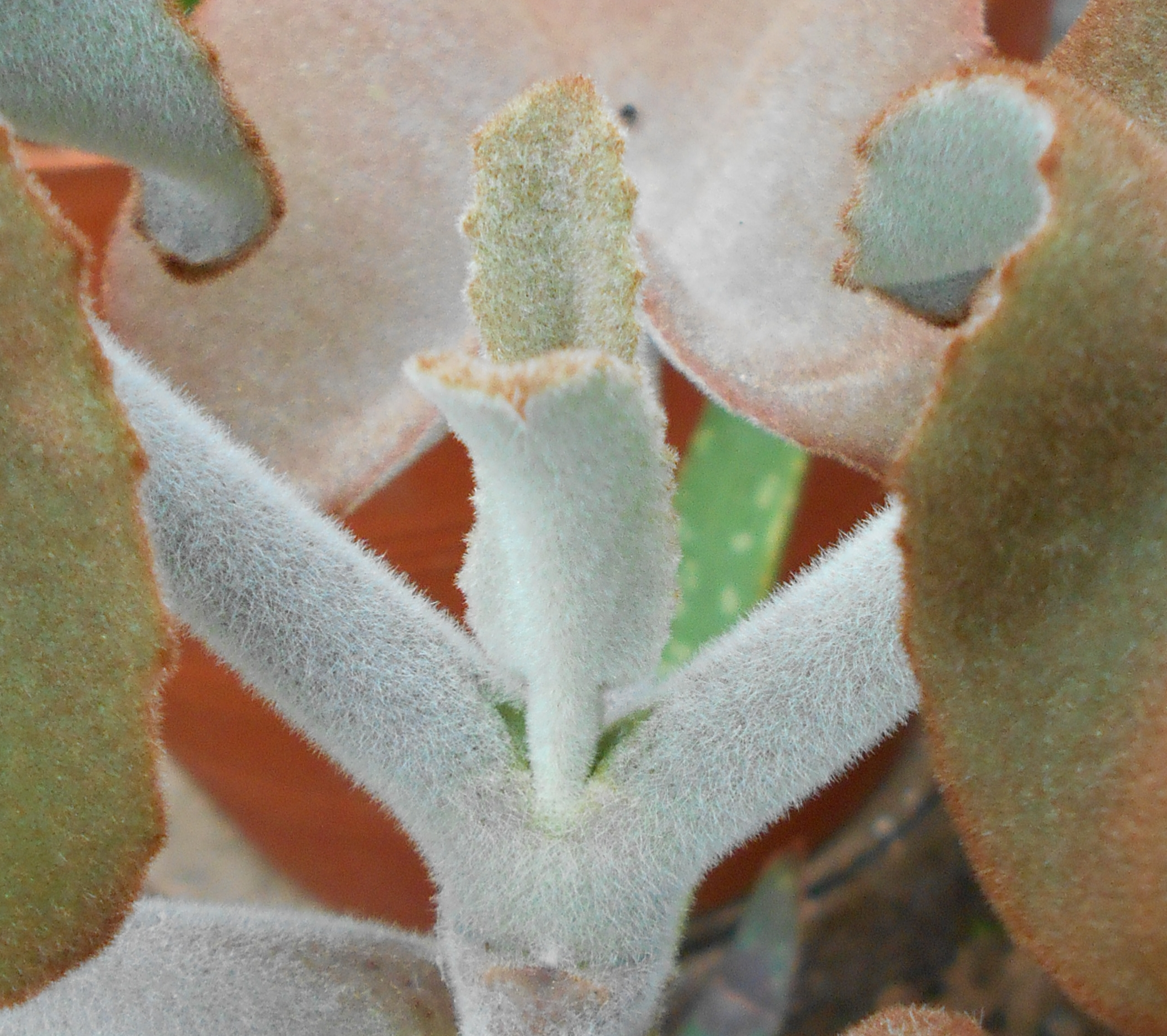 Kalanchoe beharensis, Ogród Botaniczny UMCS w Lublinie